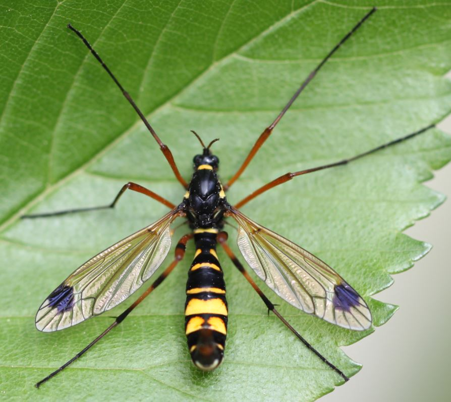 Schnake Ctenophora_festiva, Weibchen, am 1. Mai 2018 nahe Walldorf/Baden